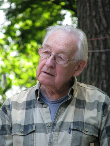 Andrzej Wajda (1926-2016), Polish film director